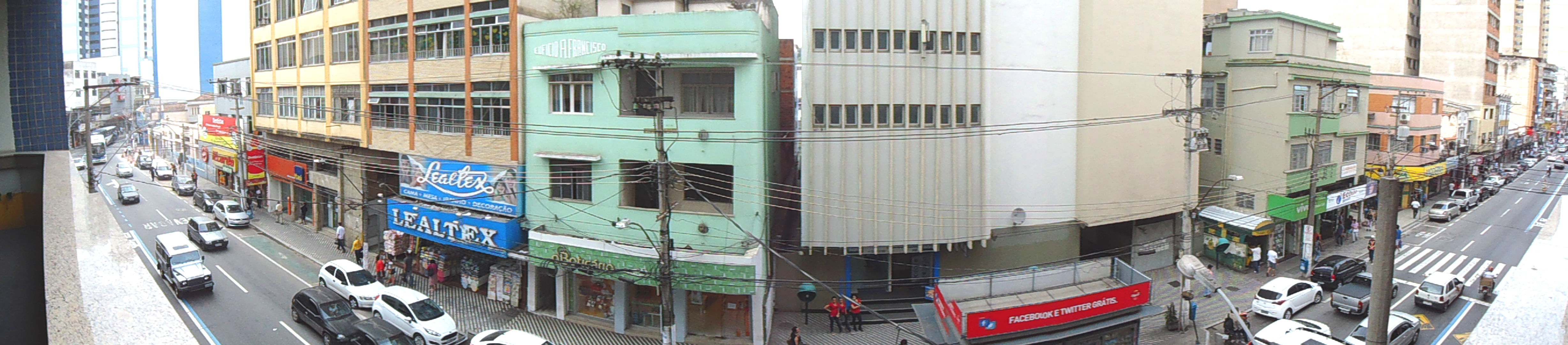 Avenida Joaquim Leite, no Centro da cidade de Barra Mansa, Brasil.